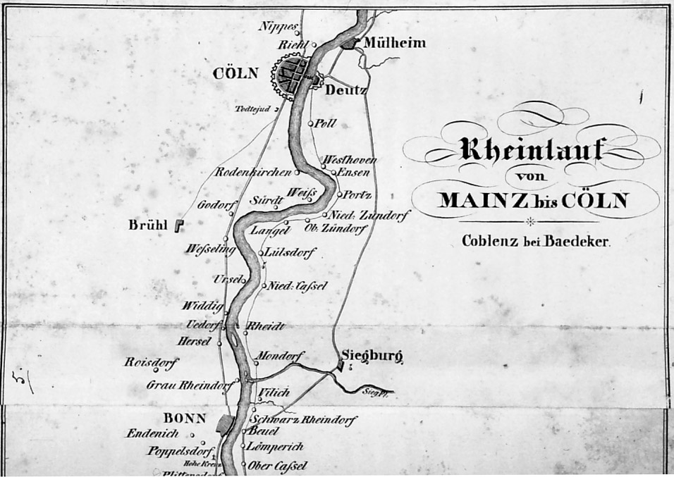 Rhein bei Köln